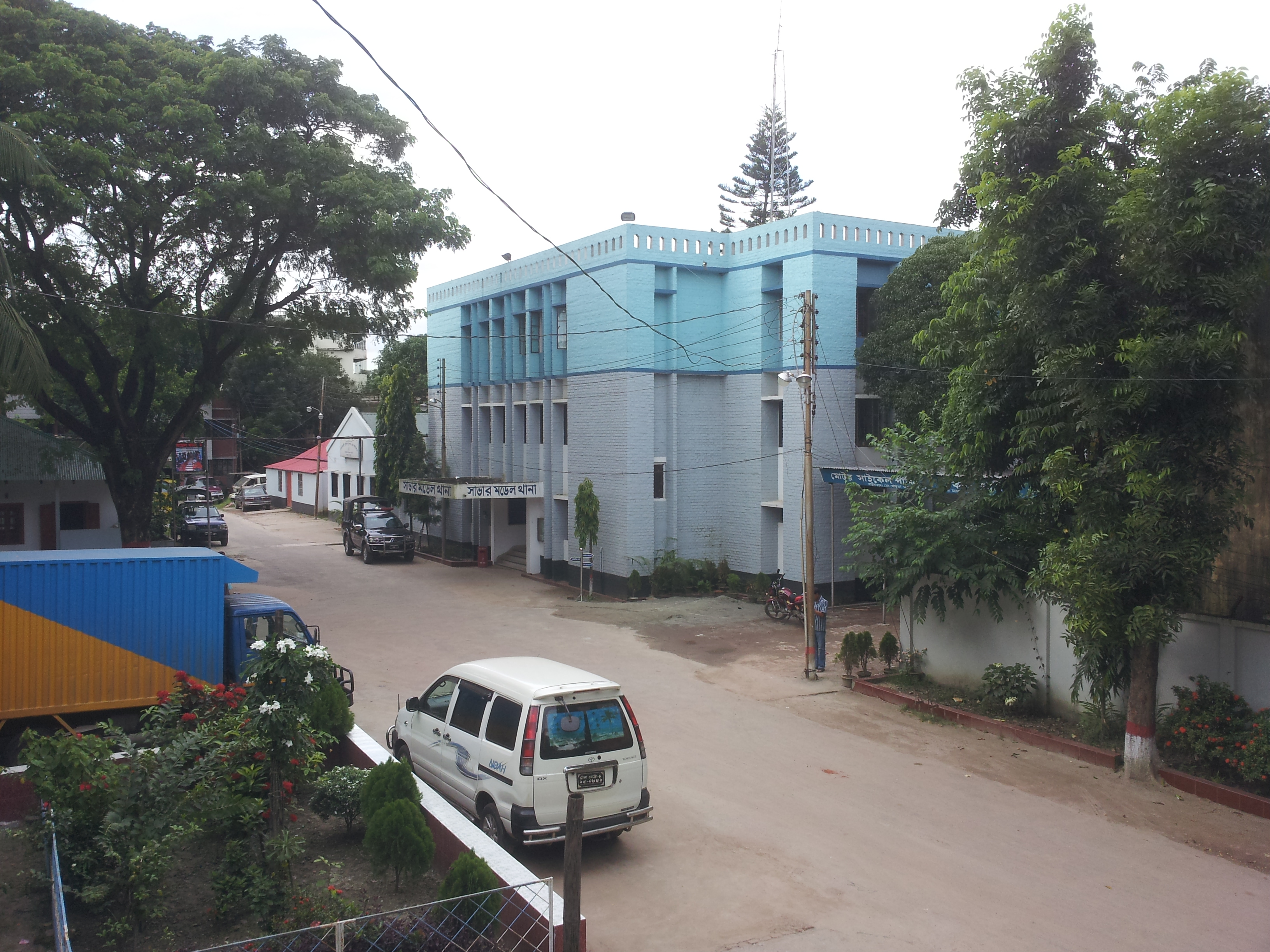 সাভার মডেল থানা পুলিশ কার্যালয়